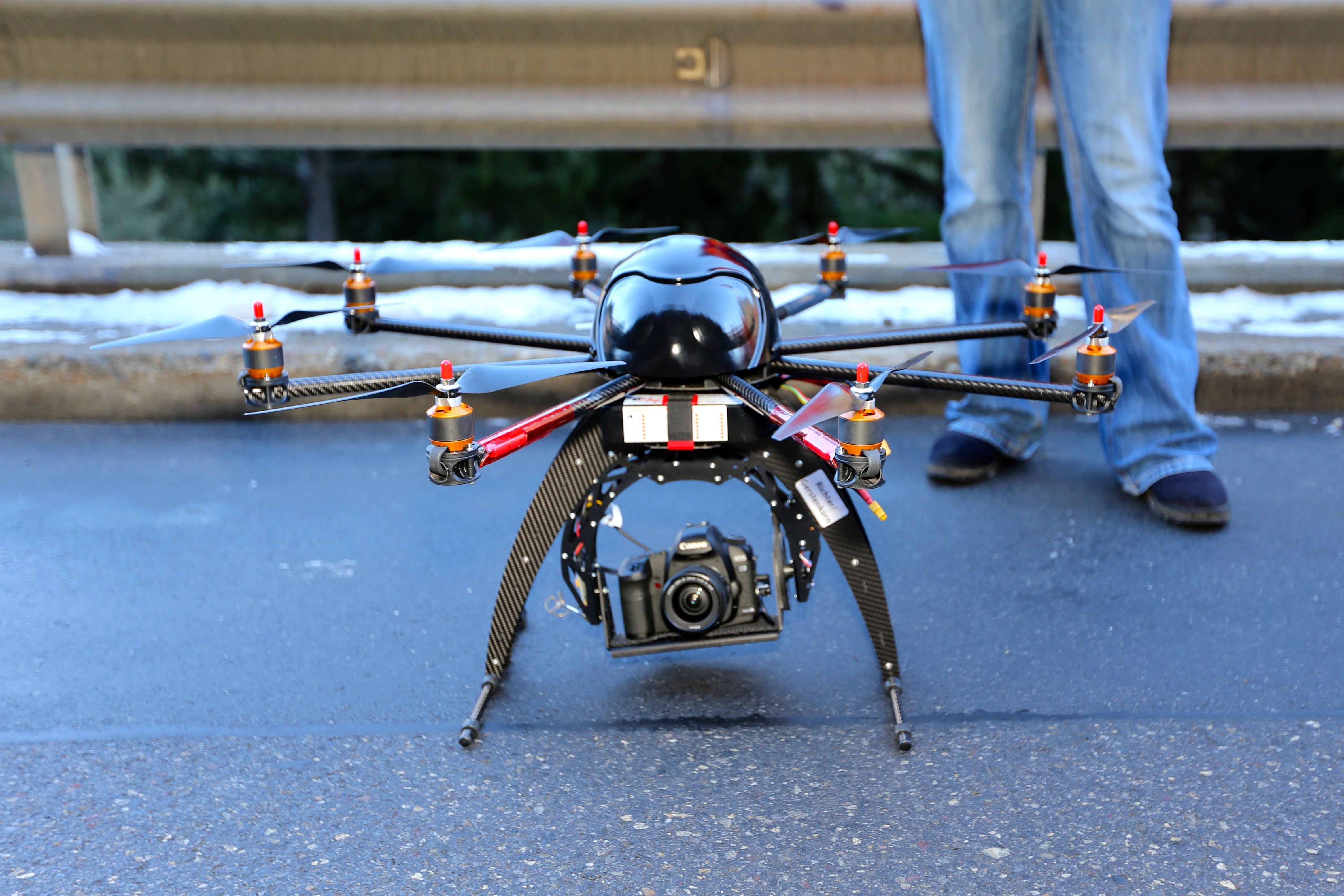 Mit einem Oktokopter werden die steinschlaggefährdeten Felswände über der Kantonsstrasse bei Rothenbrunnen GR erfasst. Im Carbon-Rahmen des Oktokopters ist ein Gyro-stabilisierter Kameraträger eingebaut, den der Kameraoperator auf zwei Achsen bis 90 Grad schwenken kann, während der Pilot den Oktokopter steuert. Die dabei gemachten Fotos mit hoher Auflösung werden später photogrammetrisch ausgewertet.